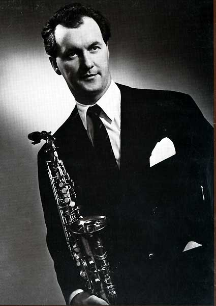 Arne Domnérerus